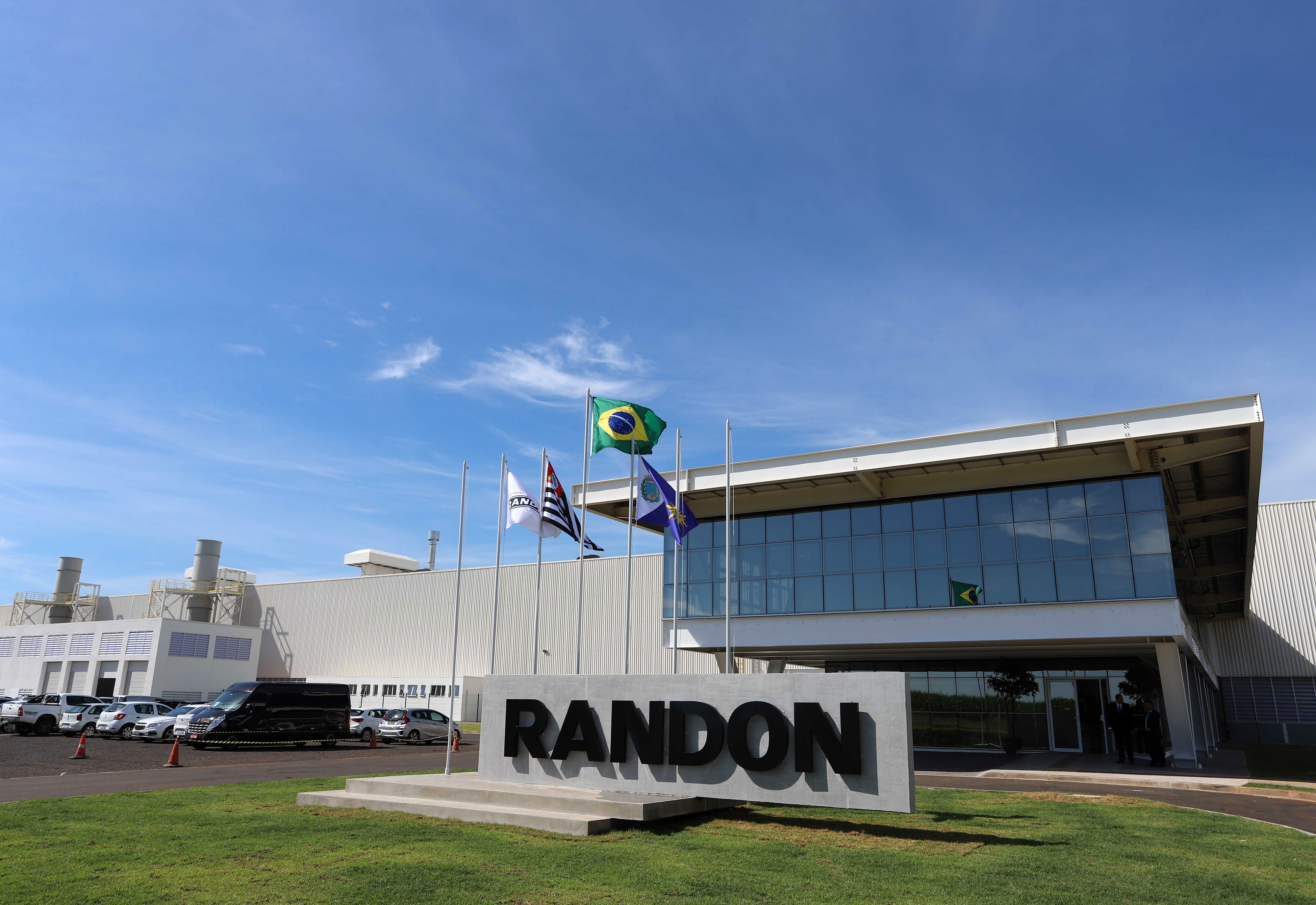 O governador do Estado de São Paulo, Geraldo Alckmin, participa da cerimônia de inauguração da nova unidade industrial da Randon S.A, em Araraquara. Local: Araraquara/SP Data: 28/03/2018 Foto: Governo do Estado de São Paulo